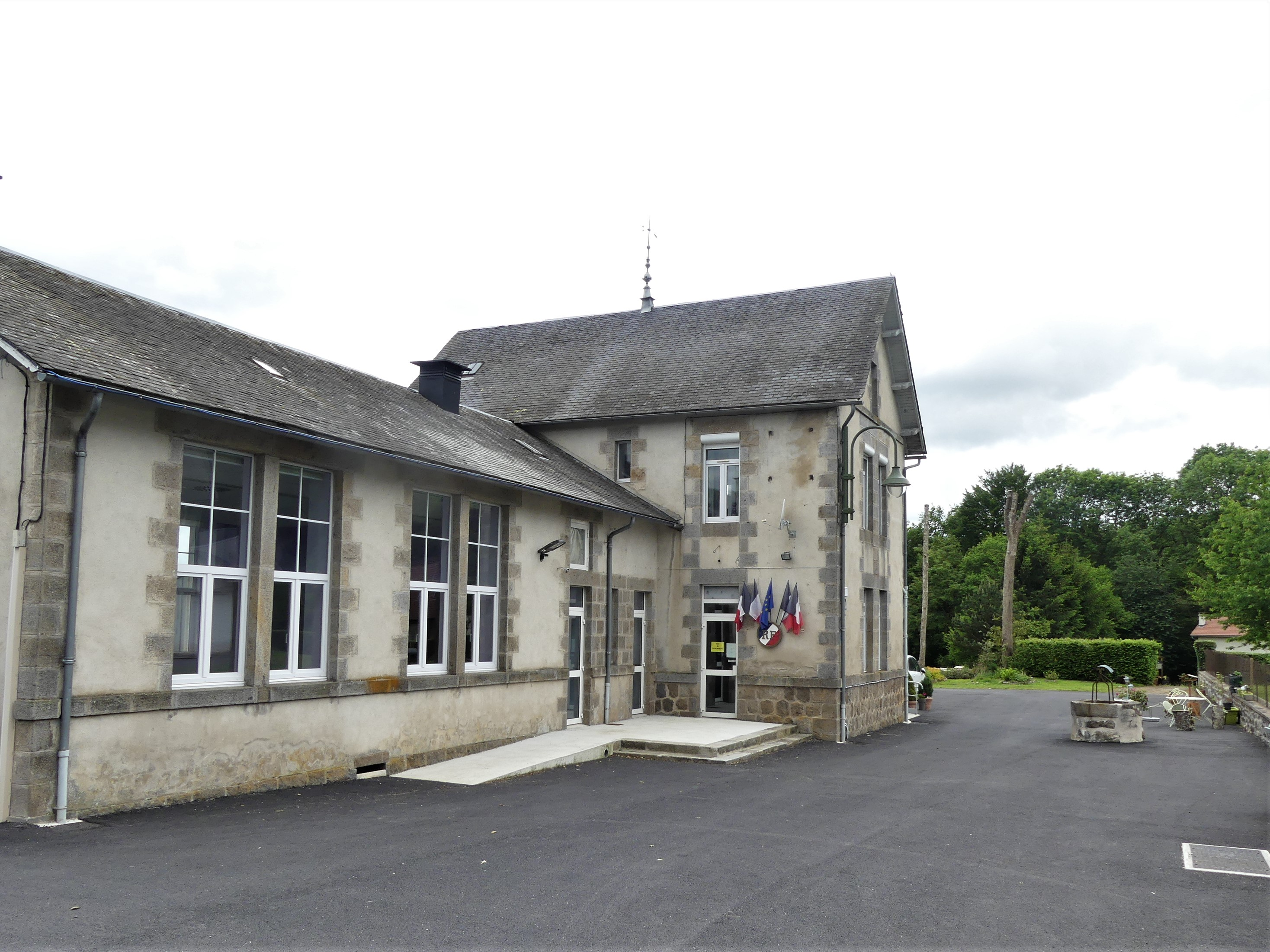 La mairie de Saint-Merd-la-Breuille, Creuse, France.